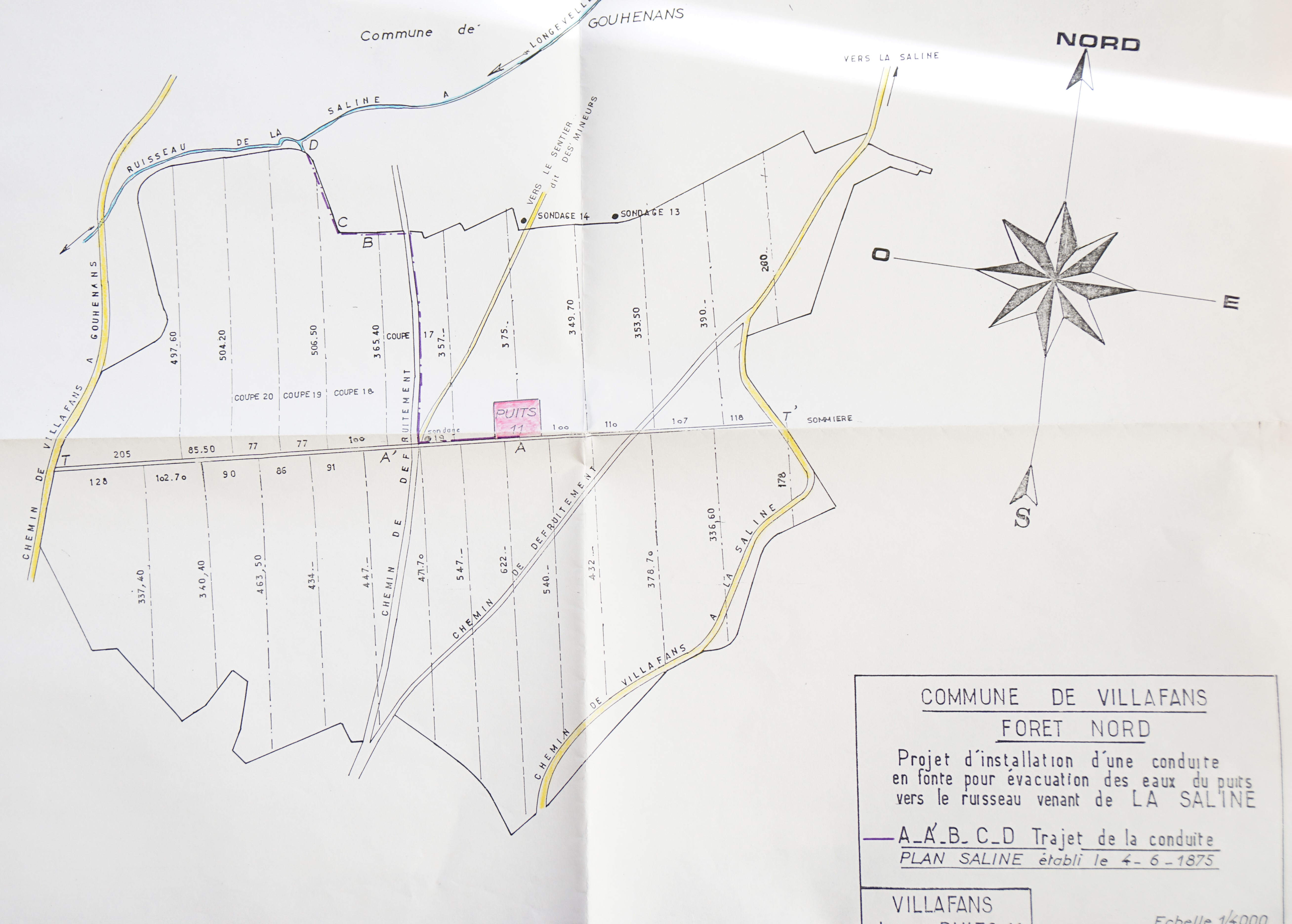 Implantation du puits n° 11 dans la forêt de villafans.